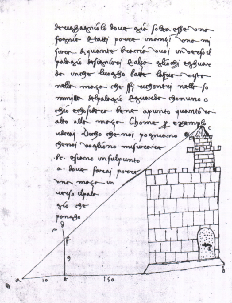 Pier maria calandri, trattato d'abacho, xv sec., biblioteca laurenziana ashb 359 c. 206v